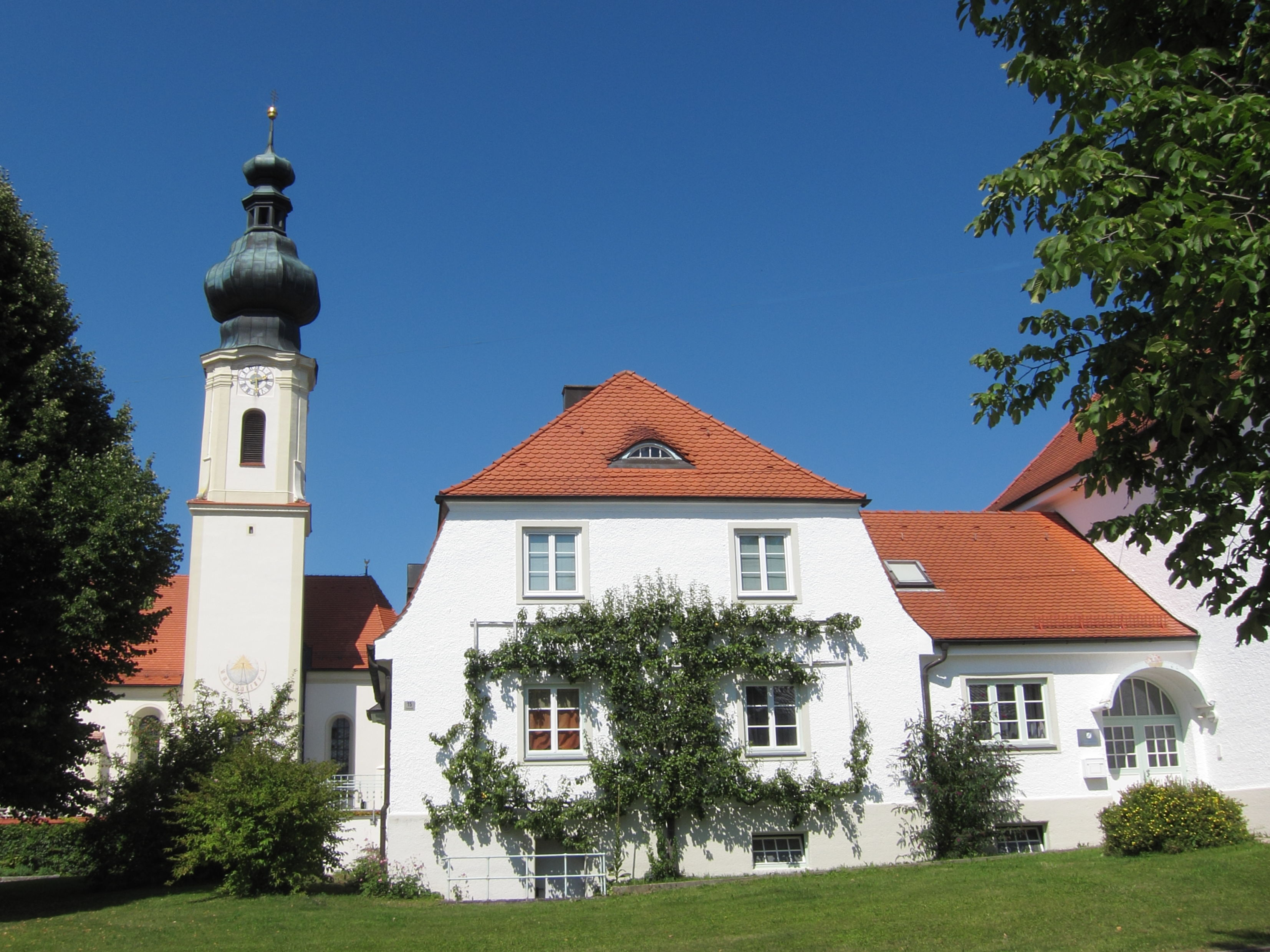 Buch am Buchrain, Hauptstr. 15; Gemeindeamt/Standesamt und kath. Pfarrkirche St. Martin